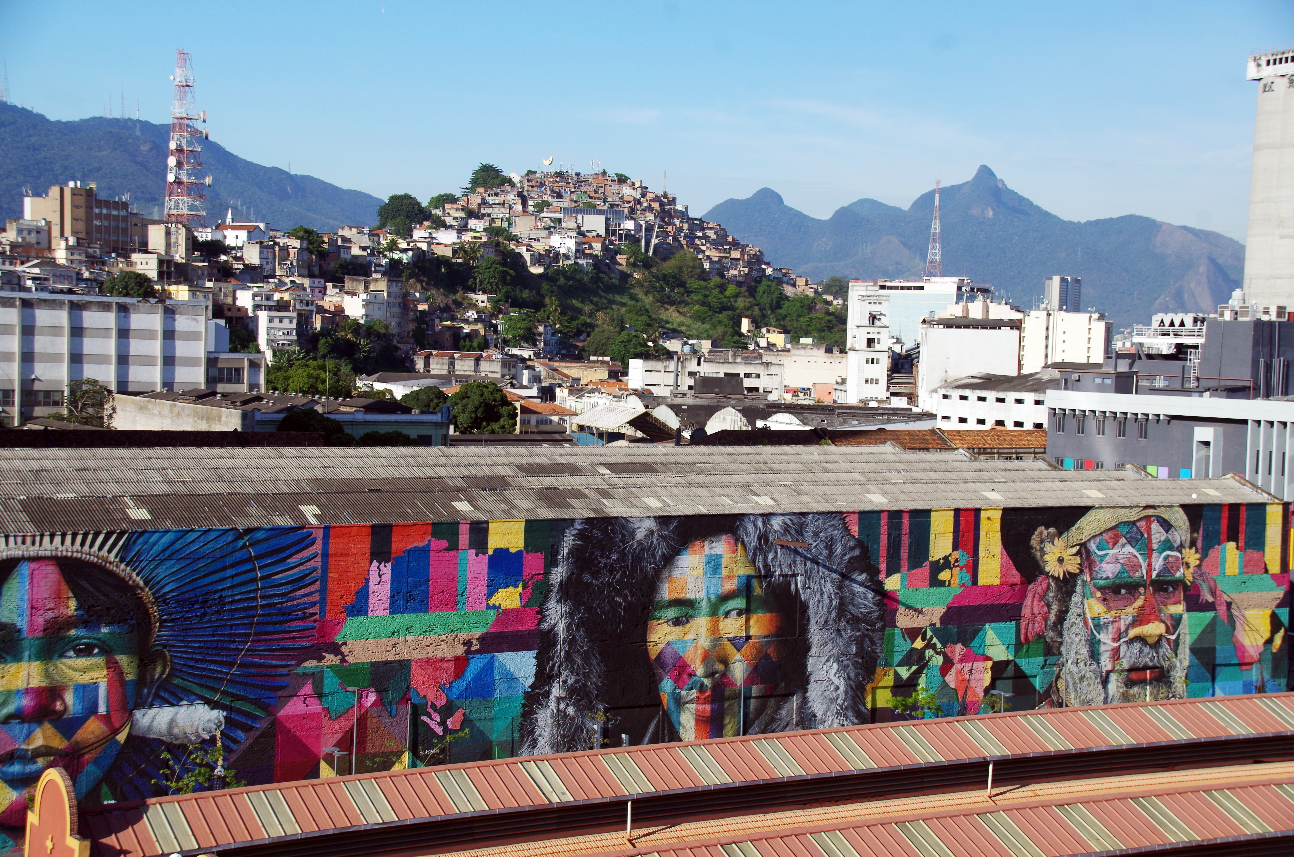 Im Hafen von Rio de Janeiro mit Blick zu einer Favela